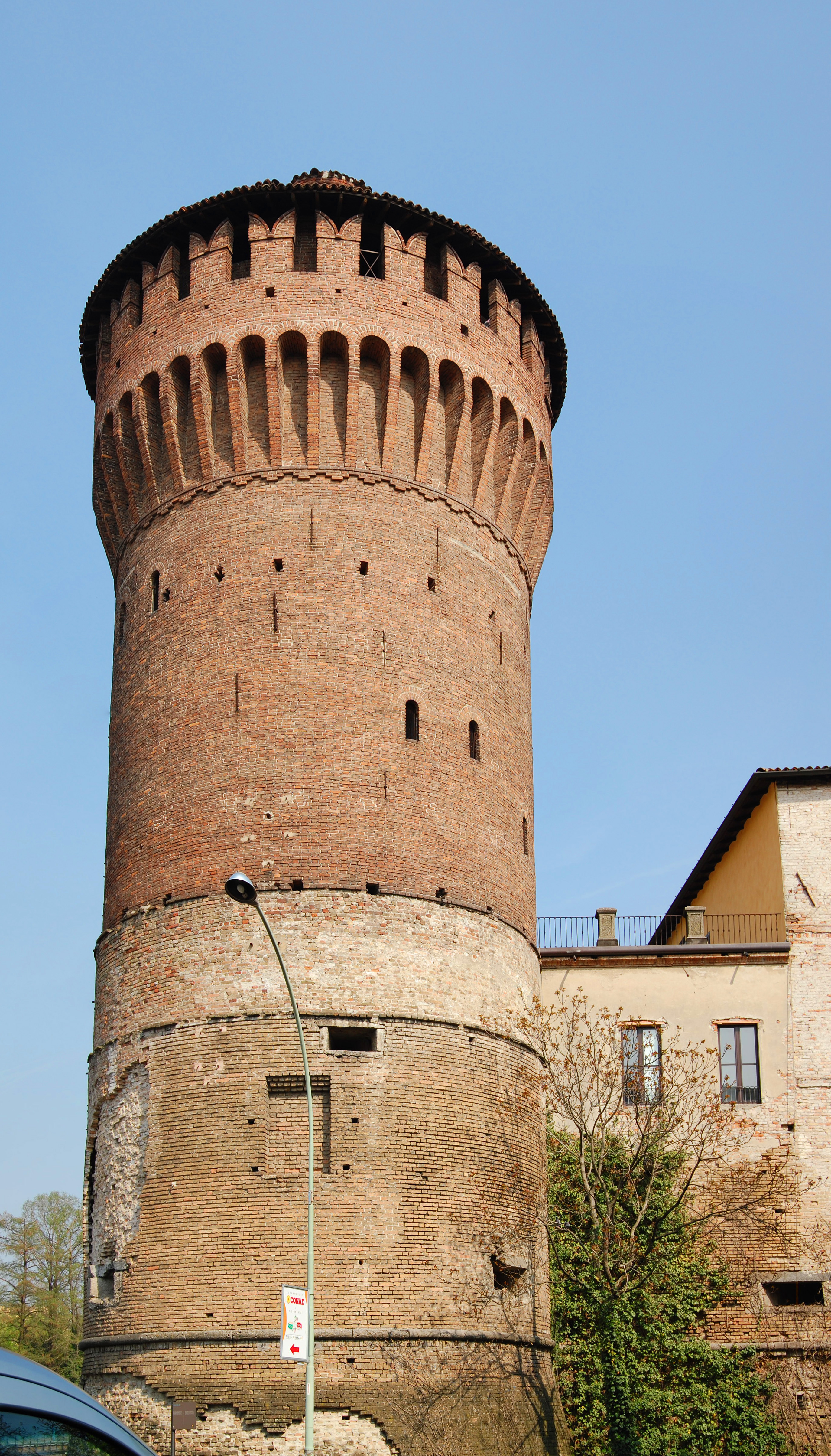 Il torrione del castello, simbolo della città di Lodi